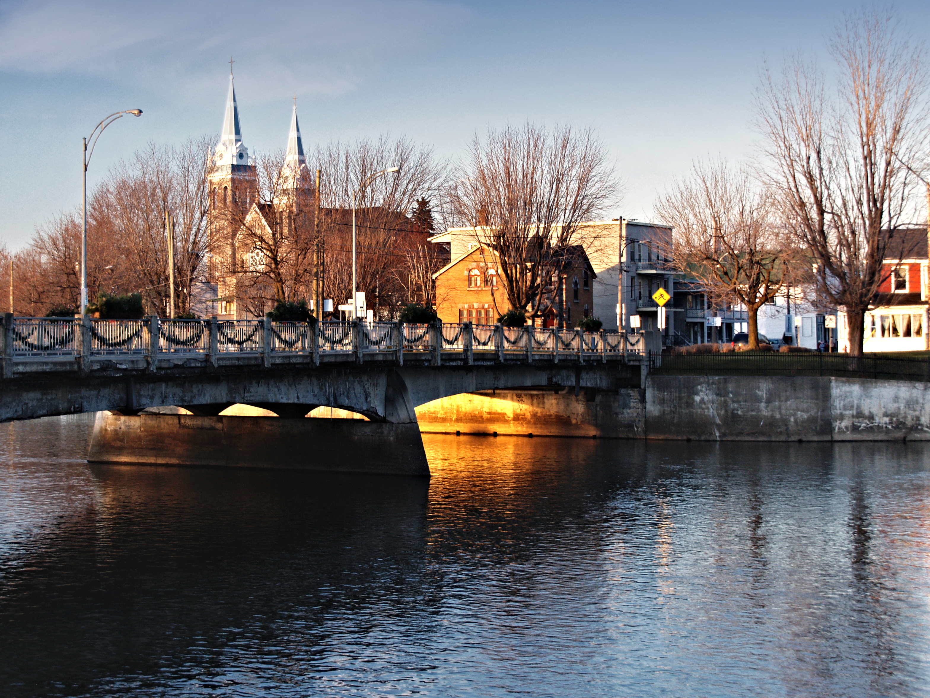 Farnham (Québec) - Pont de la rue Saint-Paul sur la Yamaska